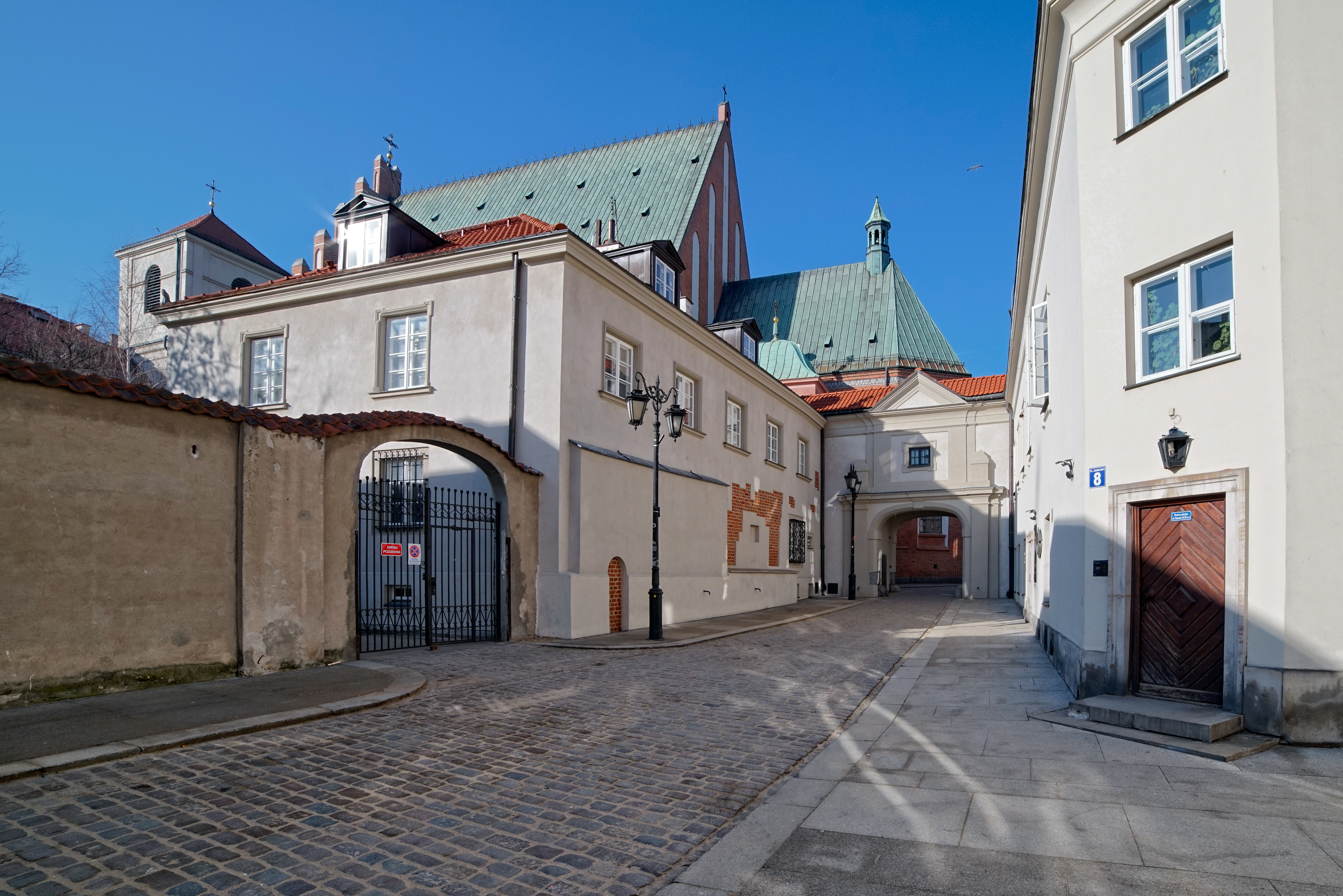 Ulica Kanonia w Warszawie